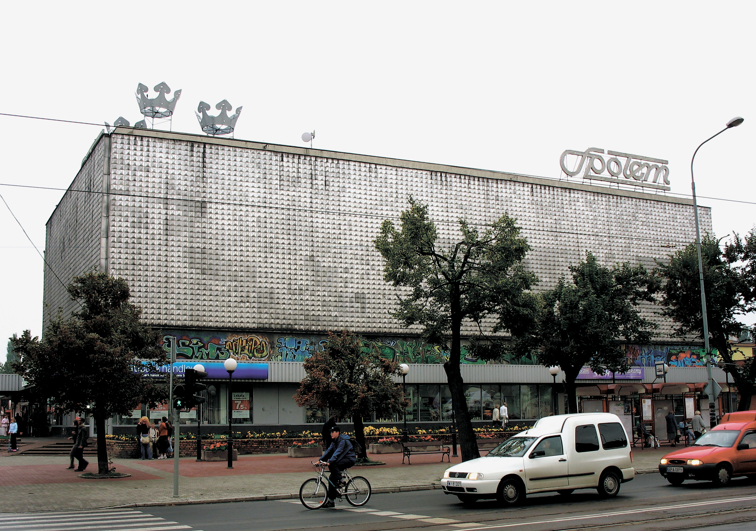 Pabianice, ul. Kilińskiego 1 - Spółdzielczy Dom Handlowy "Trzy Korony".